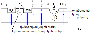 Ացետիլխոլինը ընկալիչի հետ